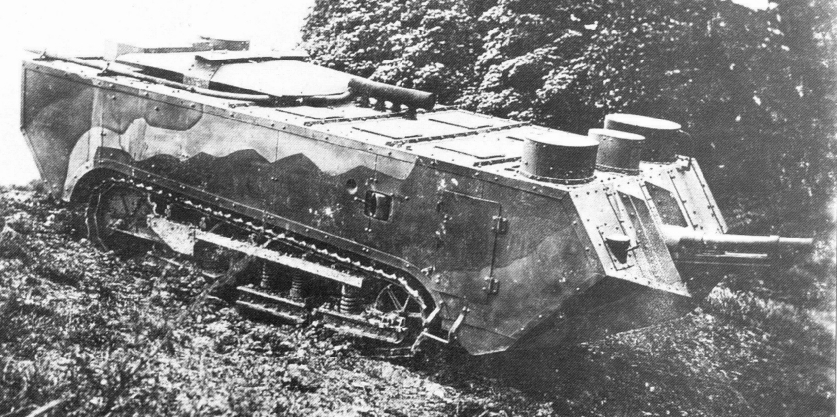 Digitale reproductie foto van St Chamond tank van het vroege type op oefening in 1917